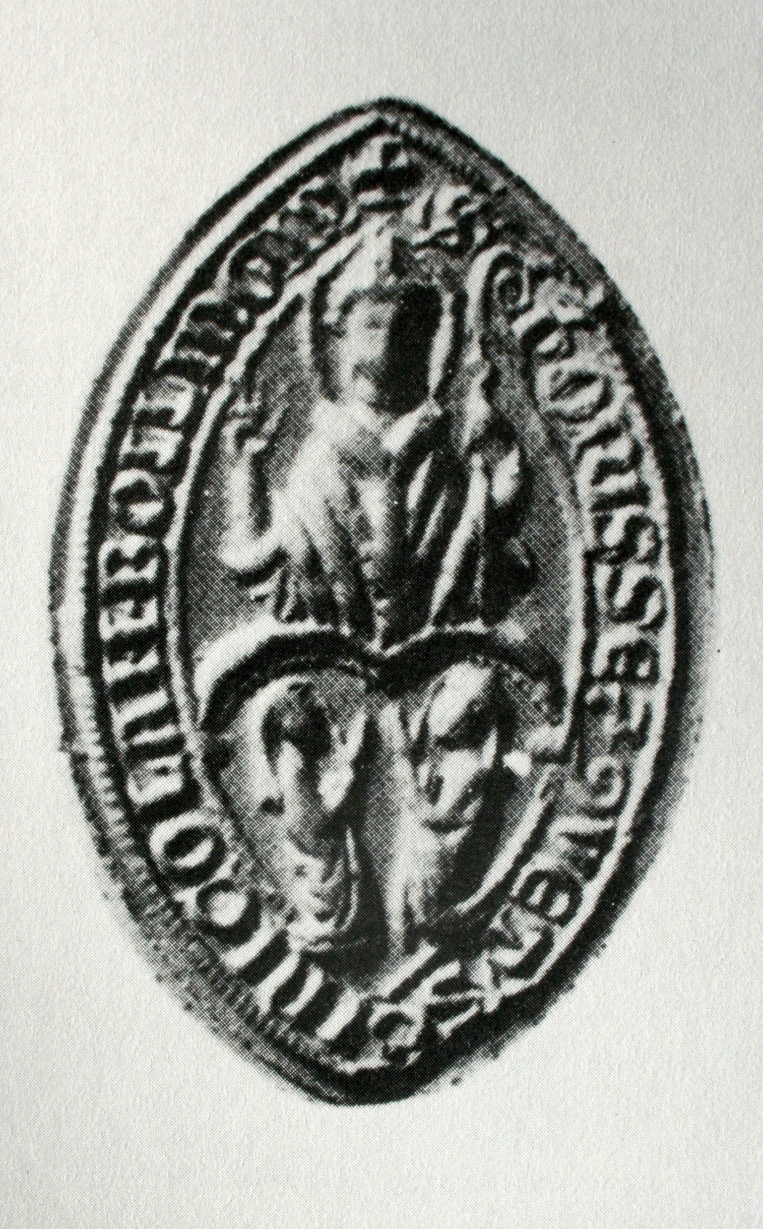 Kloster Wurmsbach: Äbtissinnensiegel an einer Urkunde vom 27. November 1269)